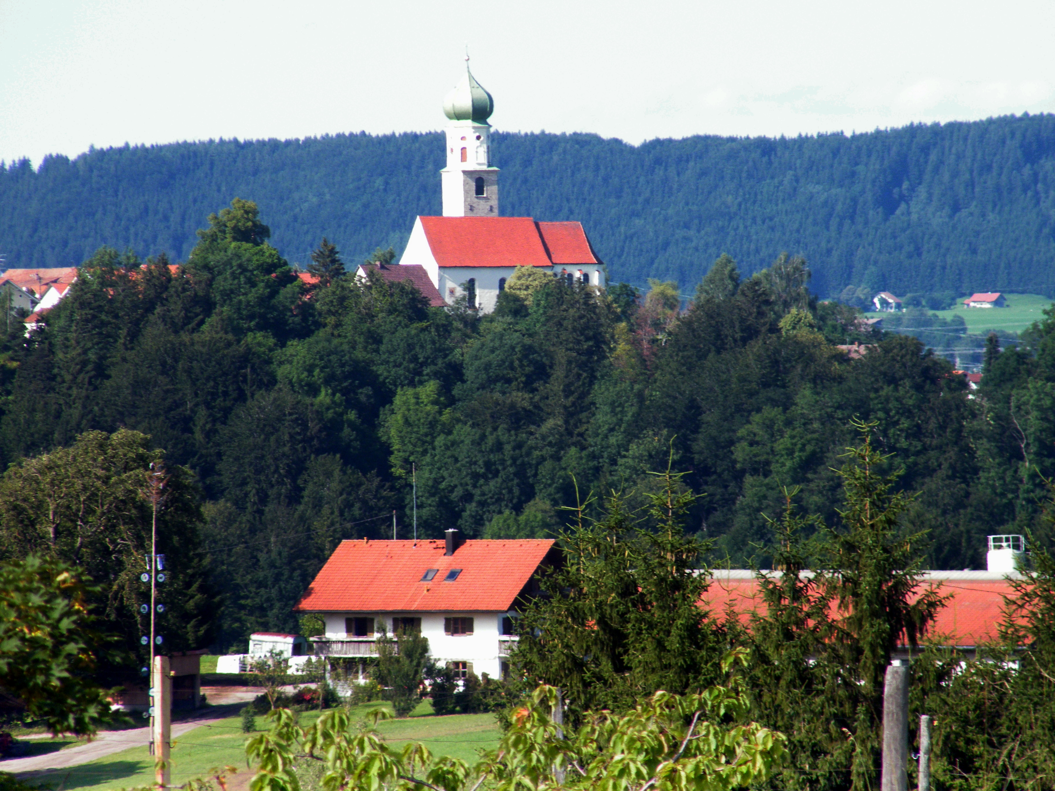 Blick über Luiblings nach Reicholzried